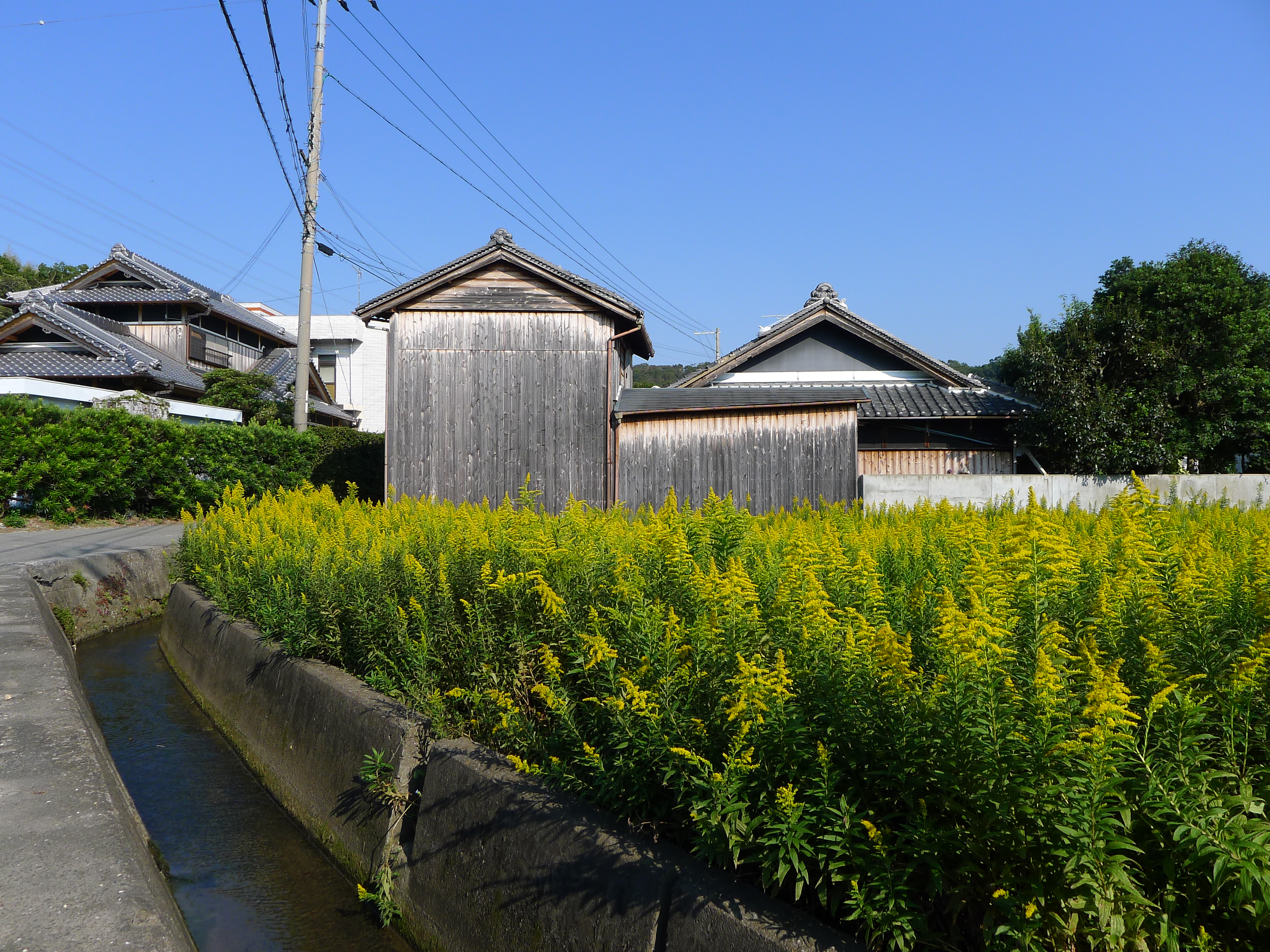 熊野古道紀伊路が通る吉里集落（和歌山県和歌山市）